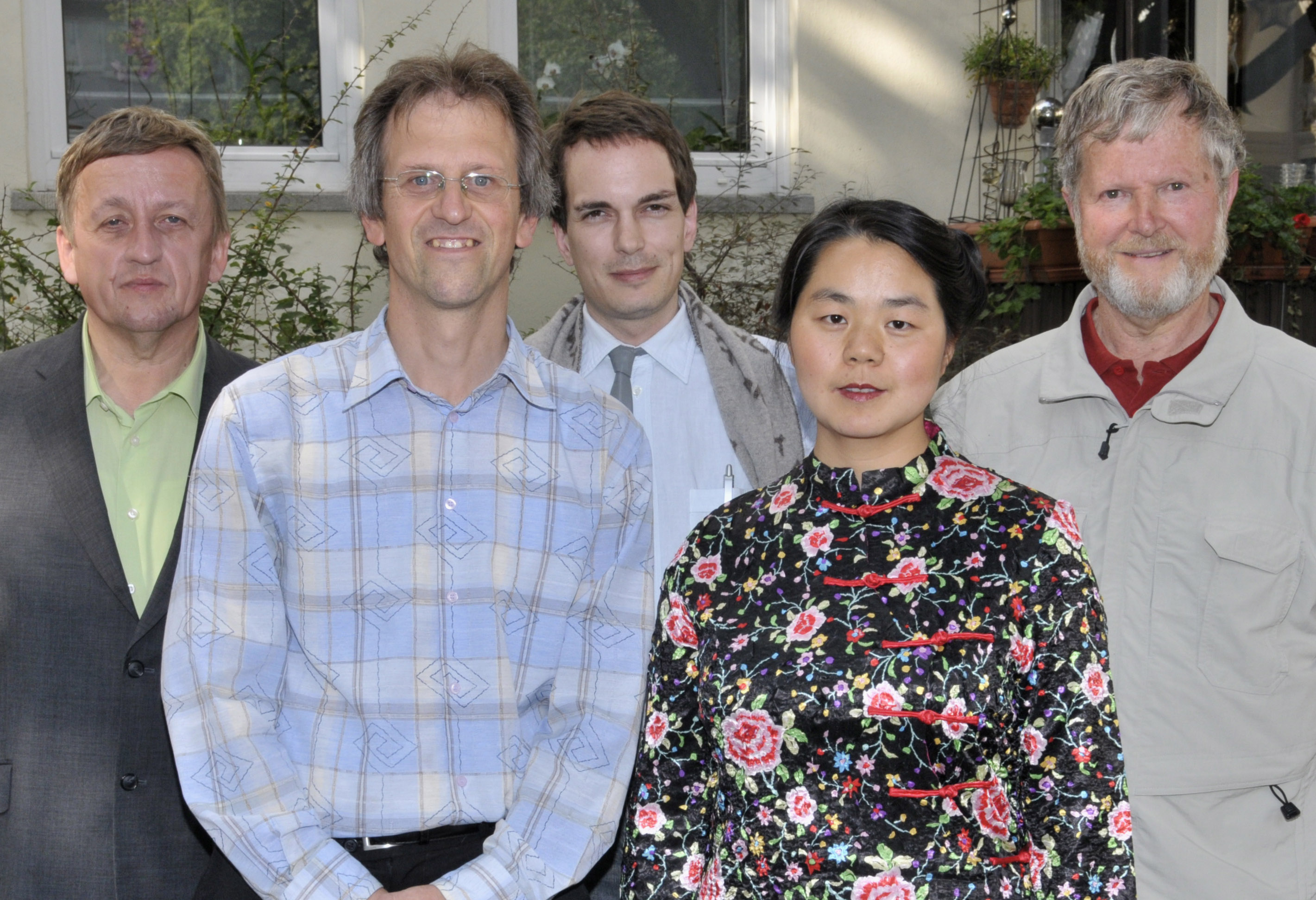 Estraro de "Eine-Welt-Partei" (5-a de septembro 2010)